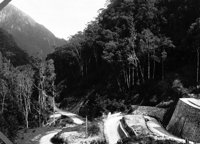 Panoramafoto. Deze foto is het linkerdeel van een uit twee delen bestaande panoramafoto (00004133-00004134).. Weg met haarspeldbochten door de kloof van Ajer Poetih